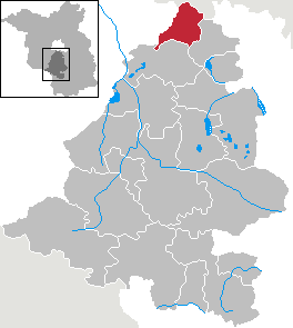 Großbeeren in Brandenburg (Country) - District Teltow-Fläming